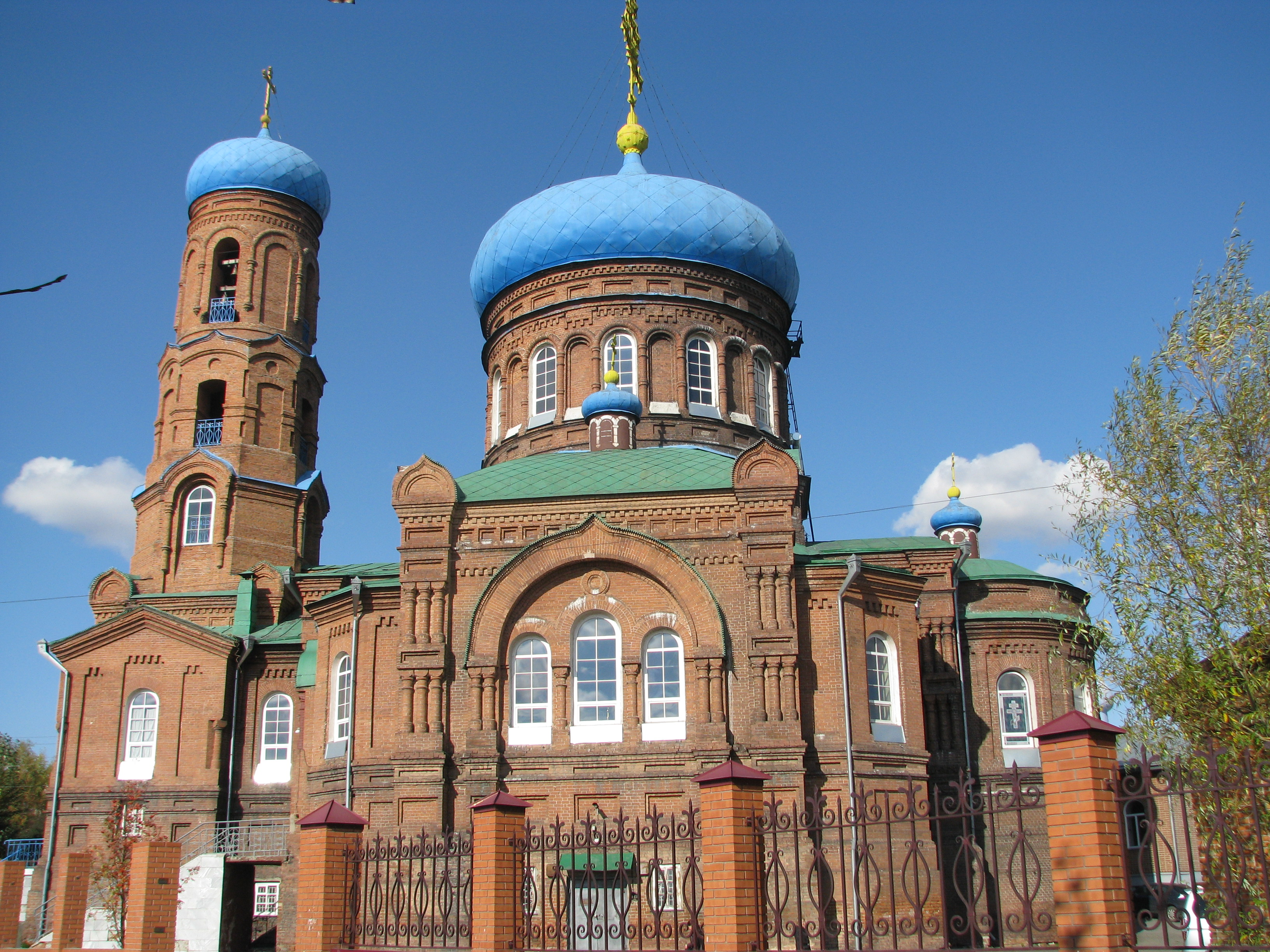 Покровский кафедральный собор (Барнаул), вид с юга